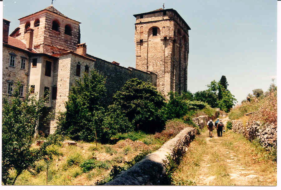 Από Χελανδάρι προς Εσφιγμένου.